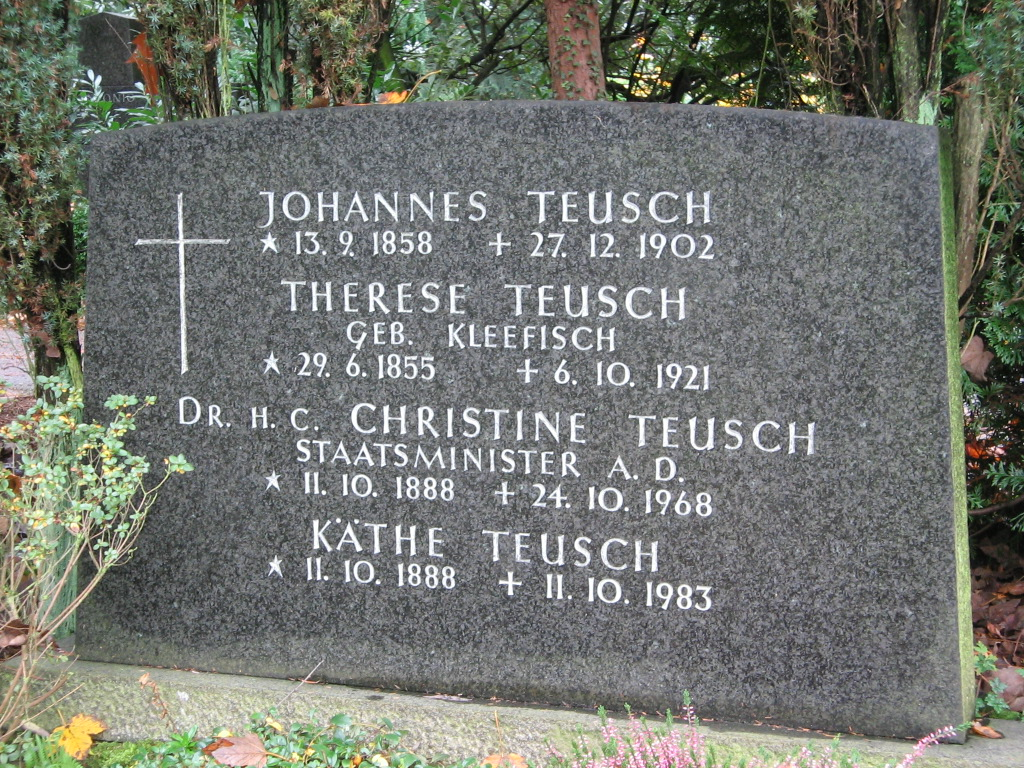 Grabstein für Christine Teusch (Politikerin) auf dem Melaten-Friedhof in Köln